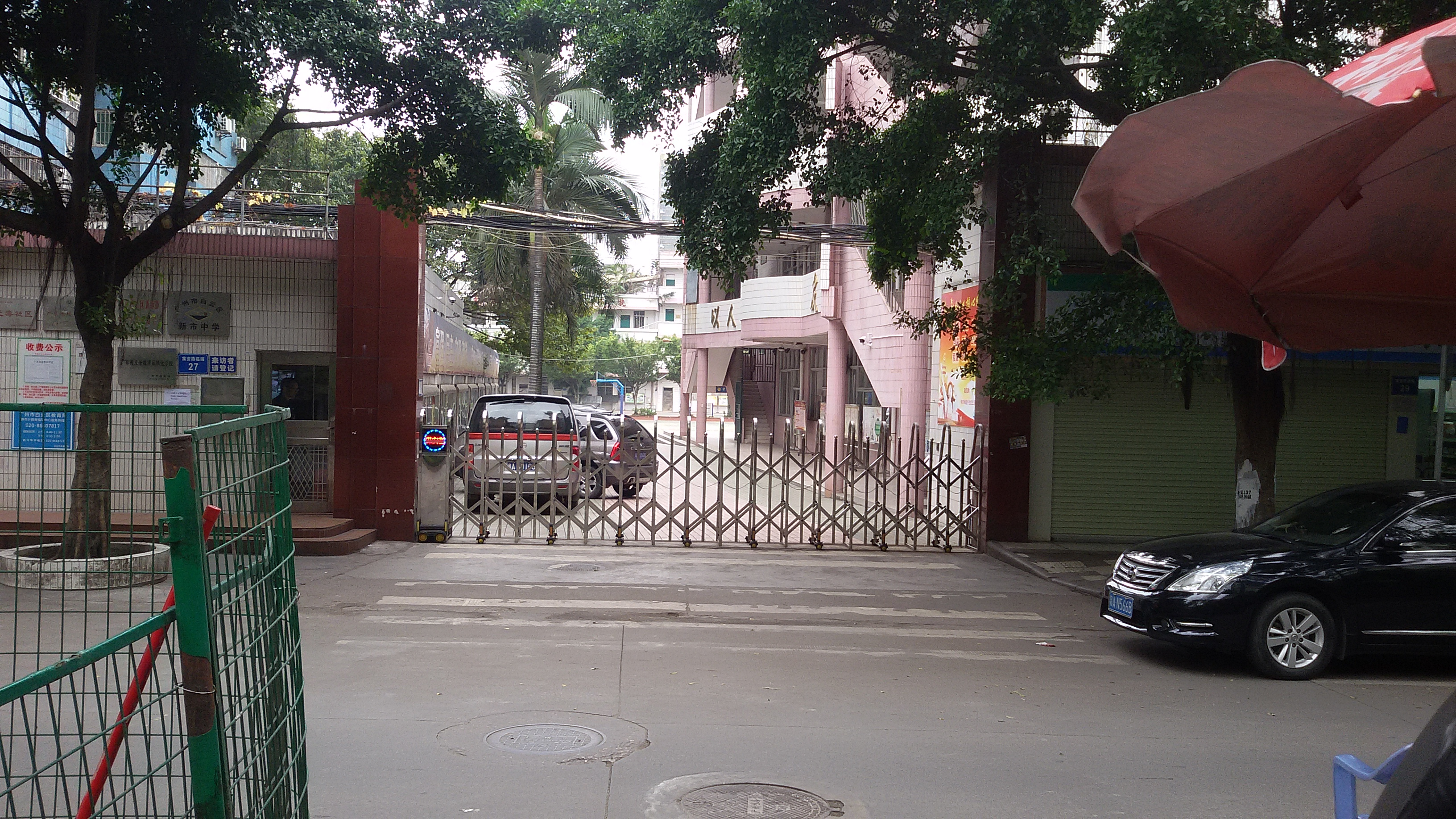 粵語: 白雲區新市中學